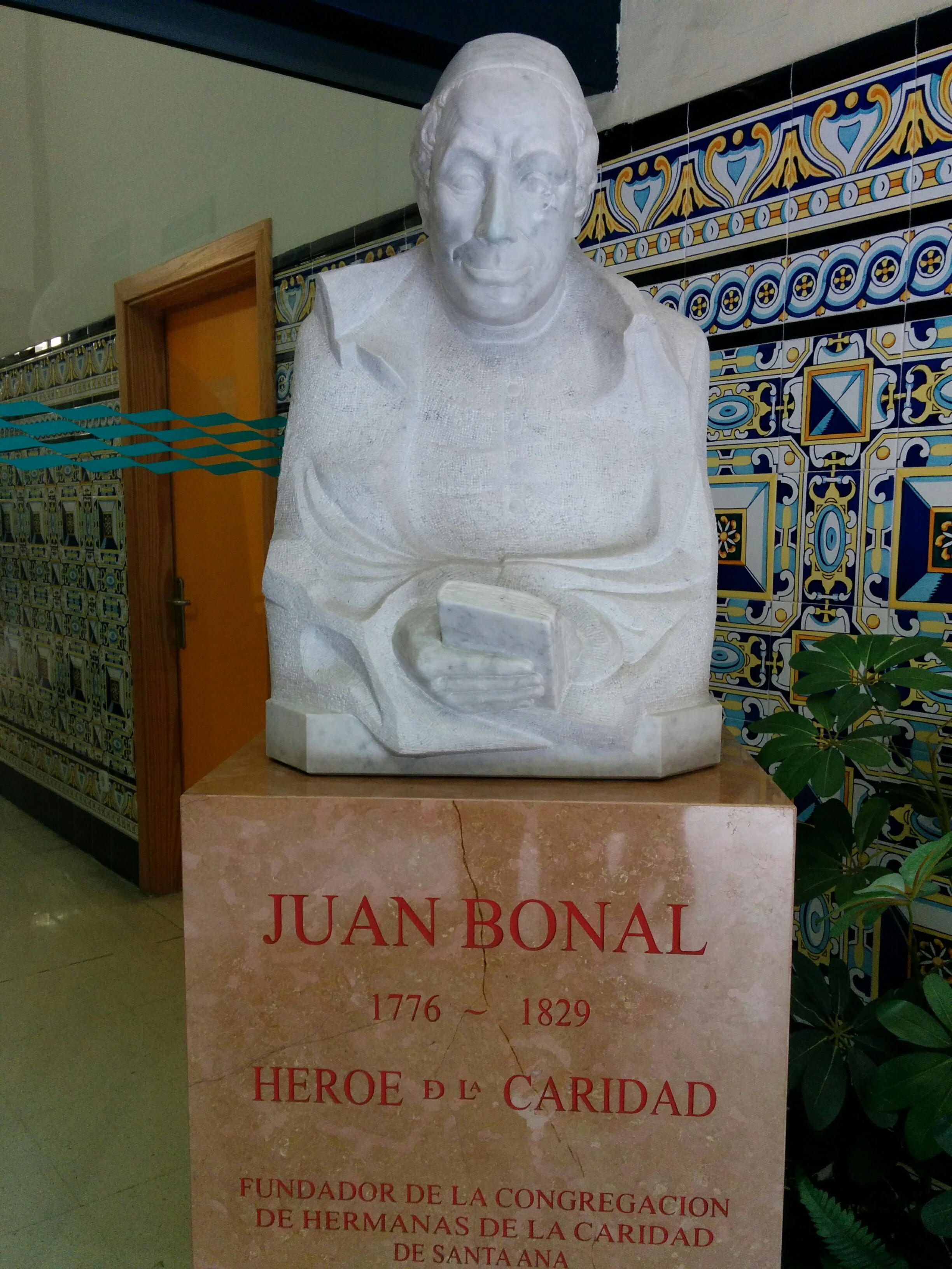 Escultura de Juan Bonal en el Hospital Provincial de Nuestra Señora de Gracia (Zaragoza).